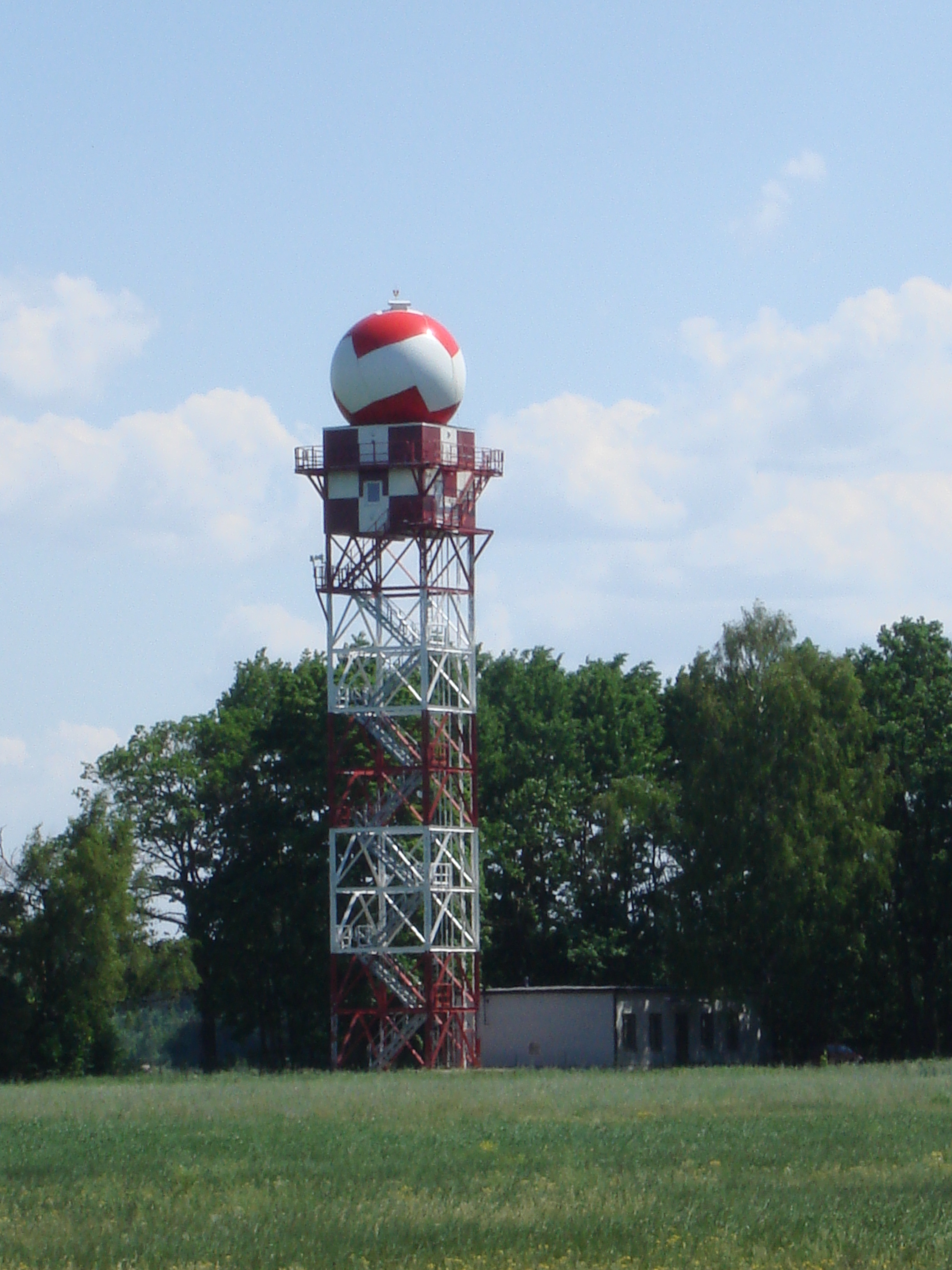 метео-радар GEMATRONIC METEOR 500C, 5.45 - 5.82 ГГц, 250 кВт